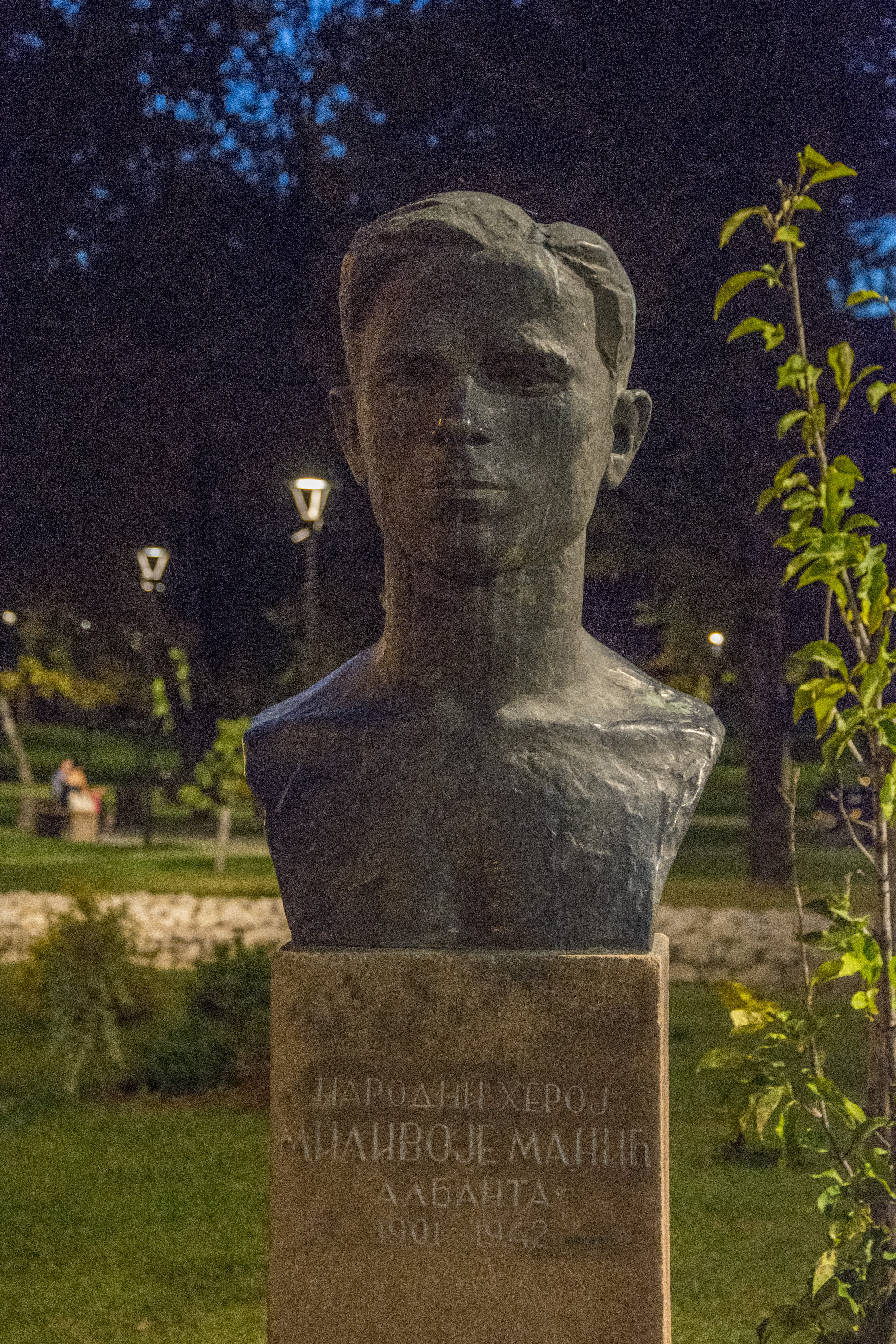 Биста Миливоју Манићу, Пирот